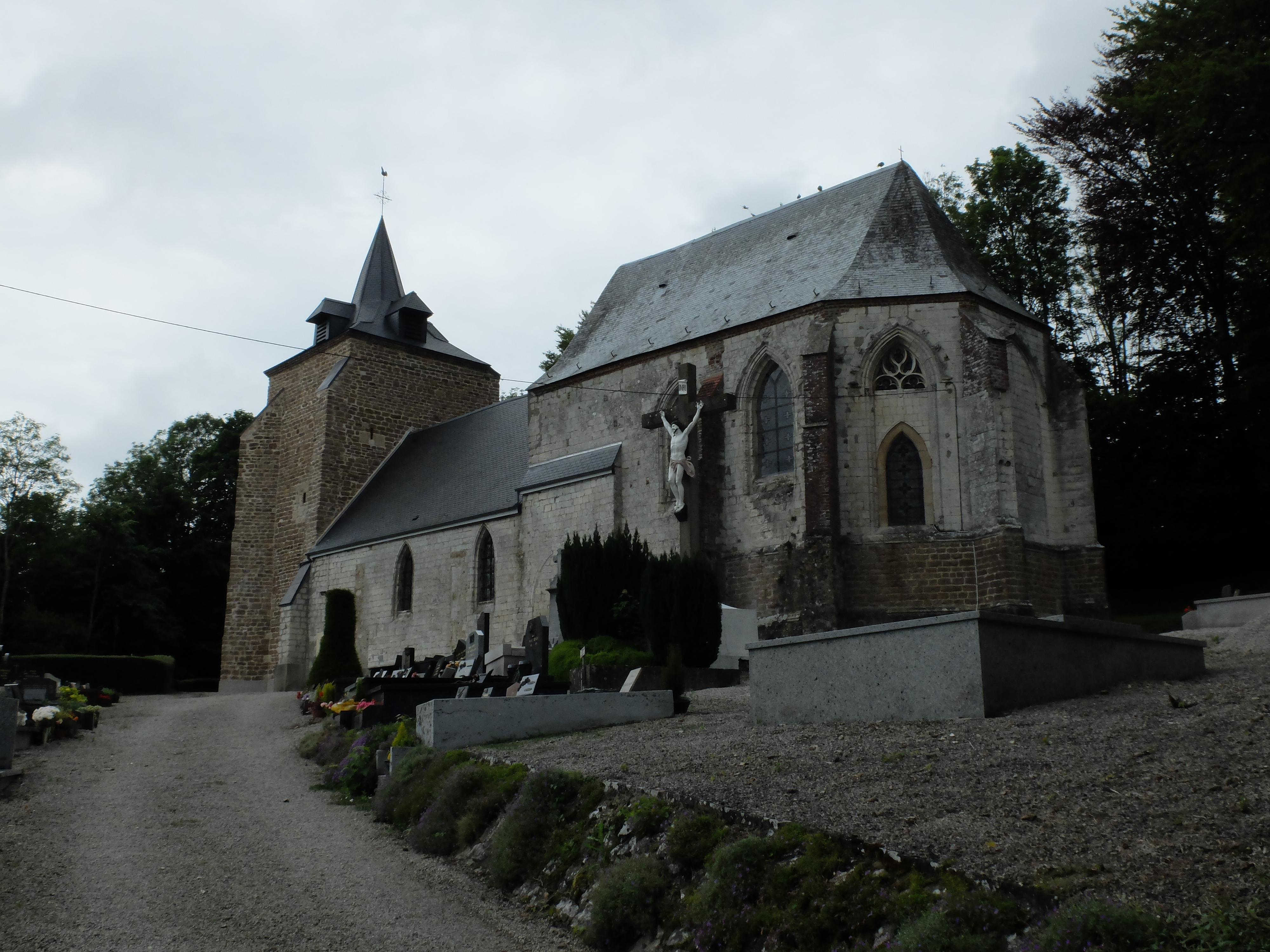 Vue de l'église Saint-Sylvestre de Longueville (Pas-de-Calais).